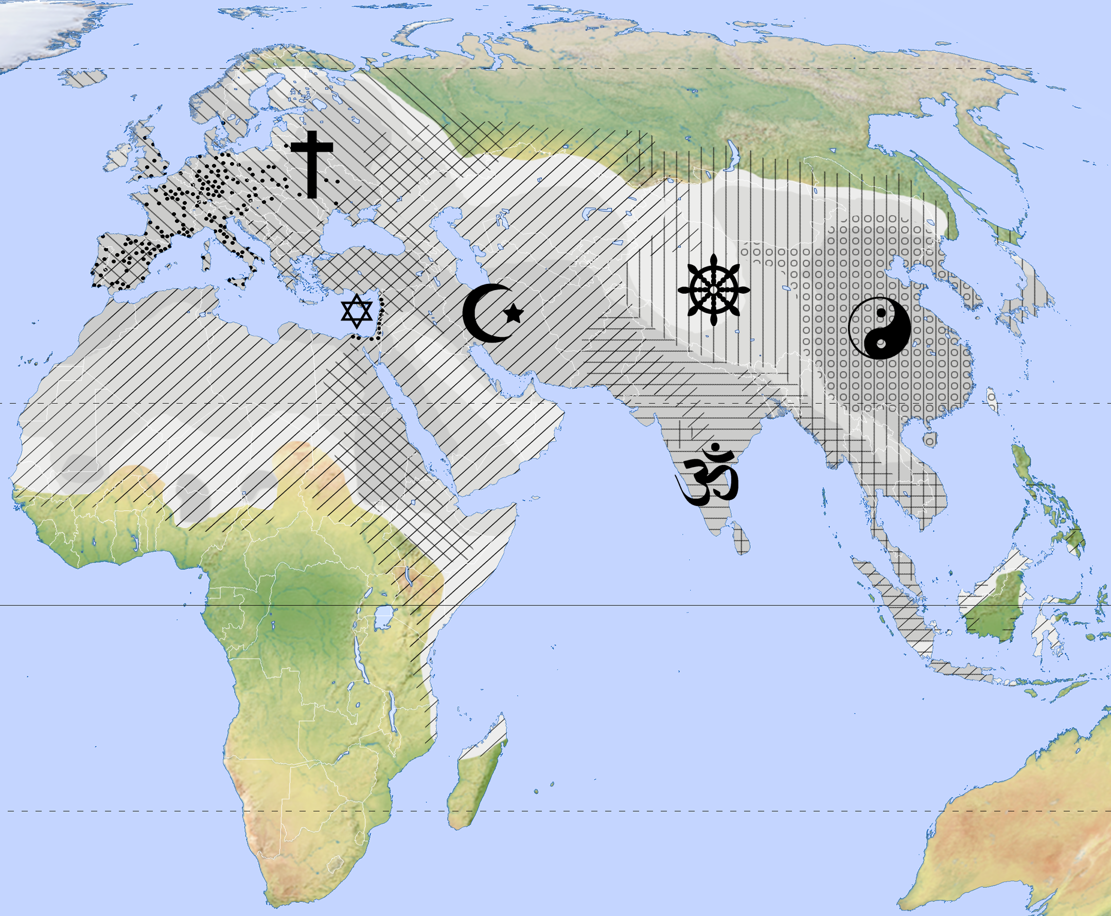 Ausbreitung der Weltreligionen bis 1500